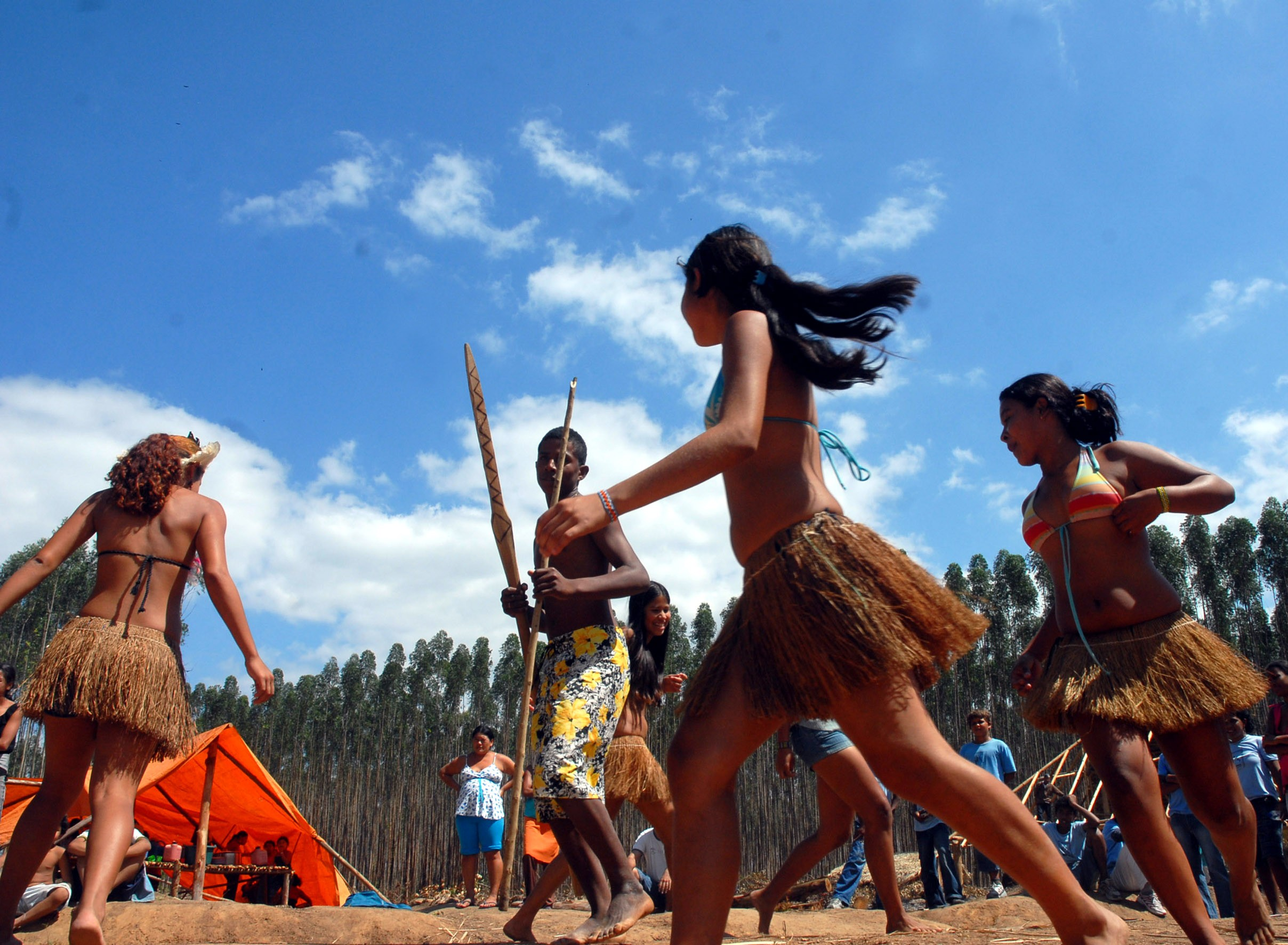 Aracruz (ES) - Na região conhecida como Areal, jovens índios tupinikim dançam ao lado de acampamento que estabeleceram em protesto pela retomada de suas terras tradicionais, em meio a plantação de eucaliptos da empresa Aracruz Celulose.